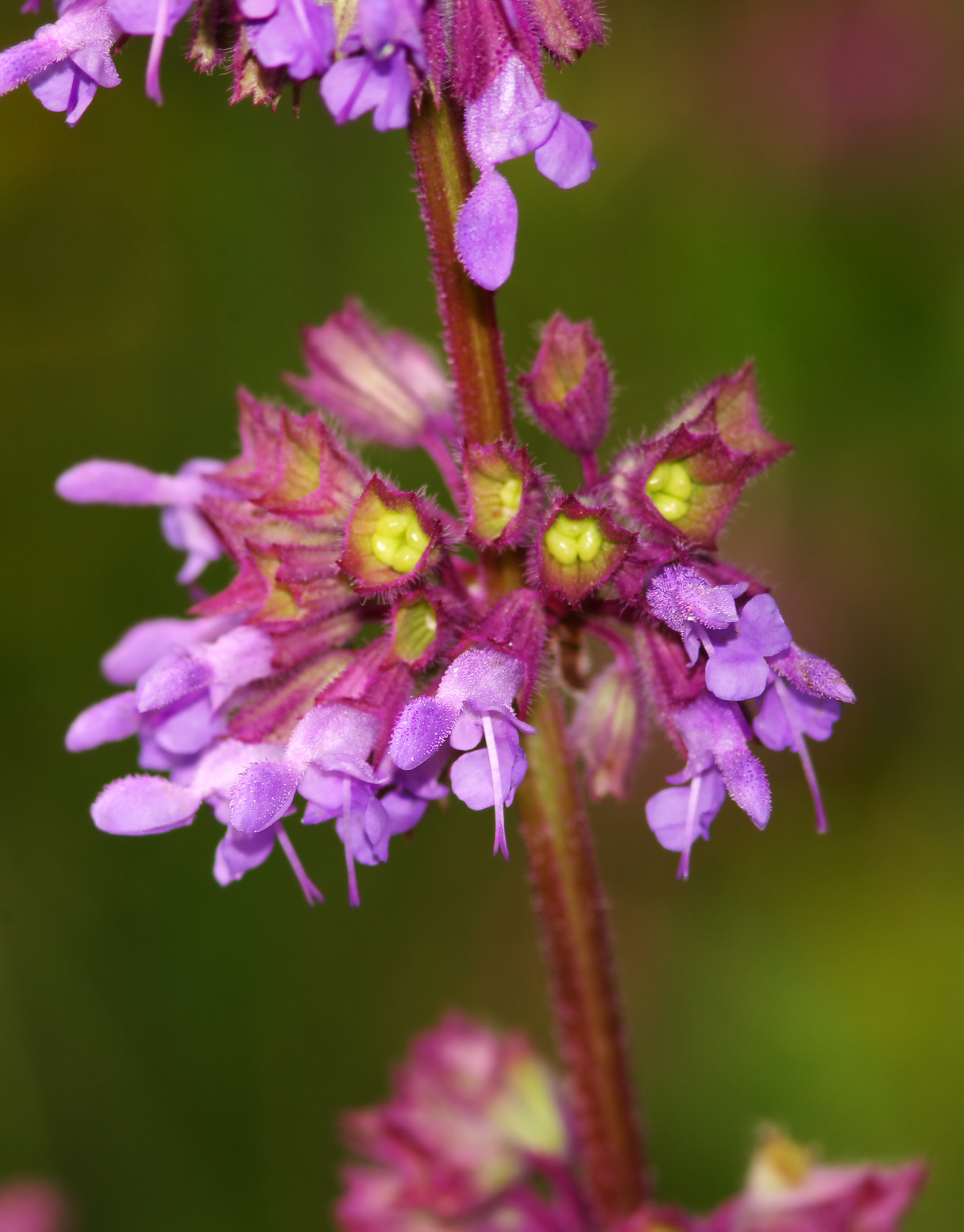 Szałwia okręgowa (Salvia verticillata)